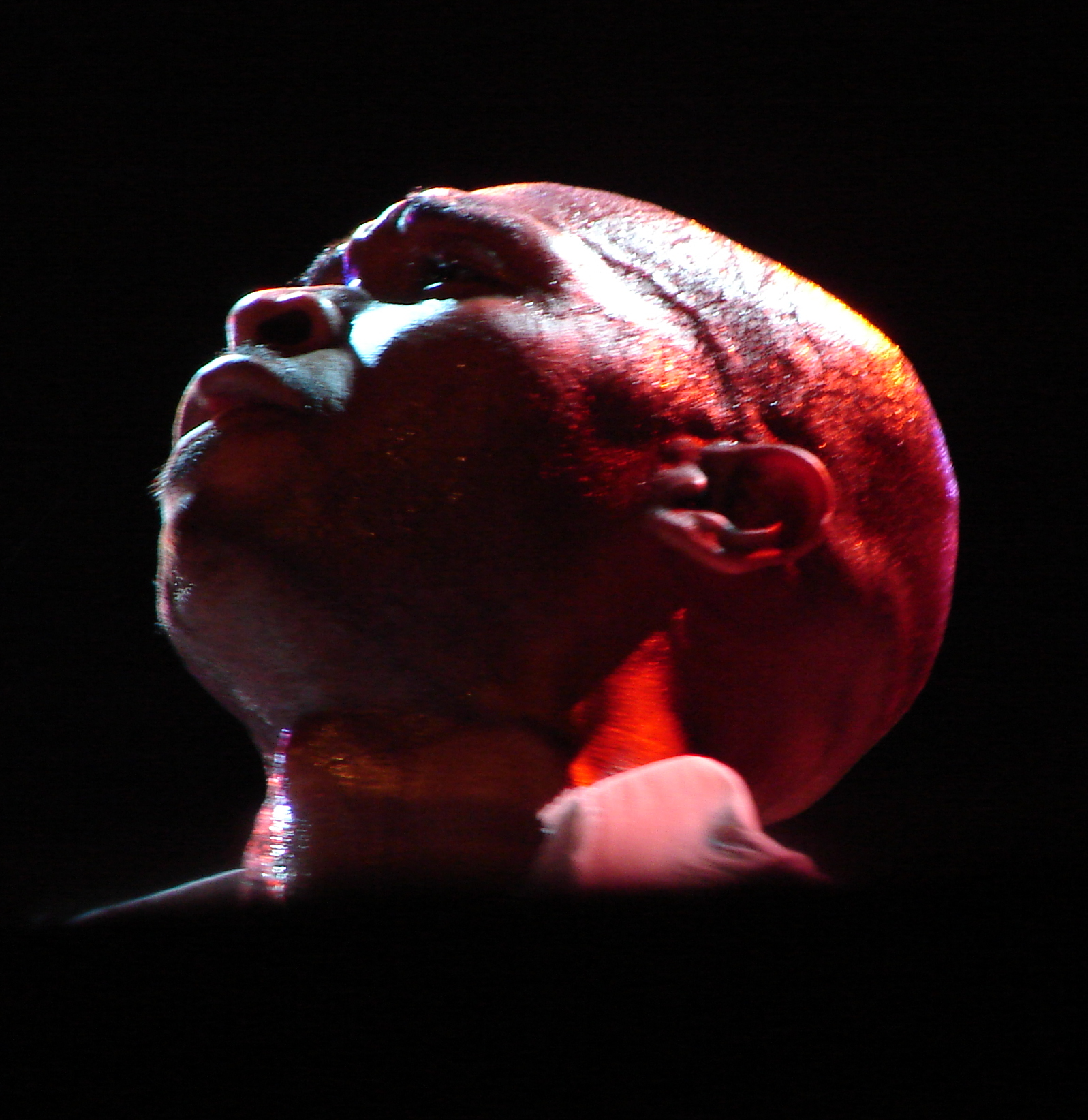 Drummer Eric Harland